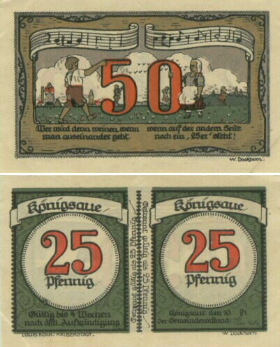 Notgeld aus Königsaue: Gutschein über 50 Pfennig, teilbar in zwei 25 Pfennig Scheine